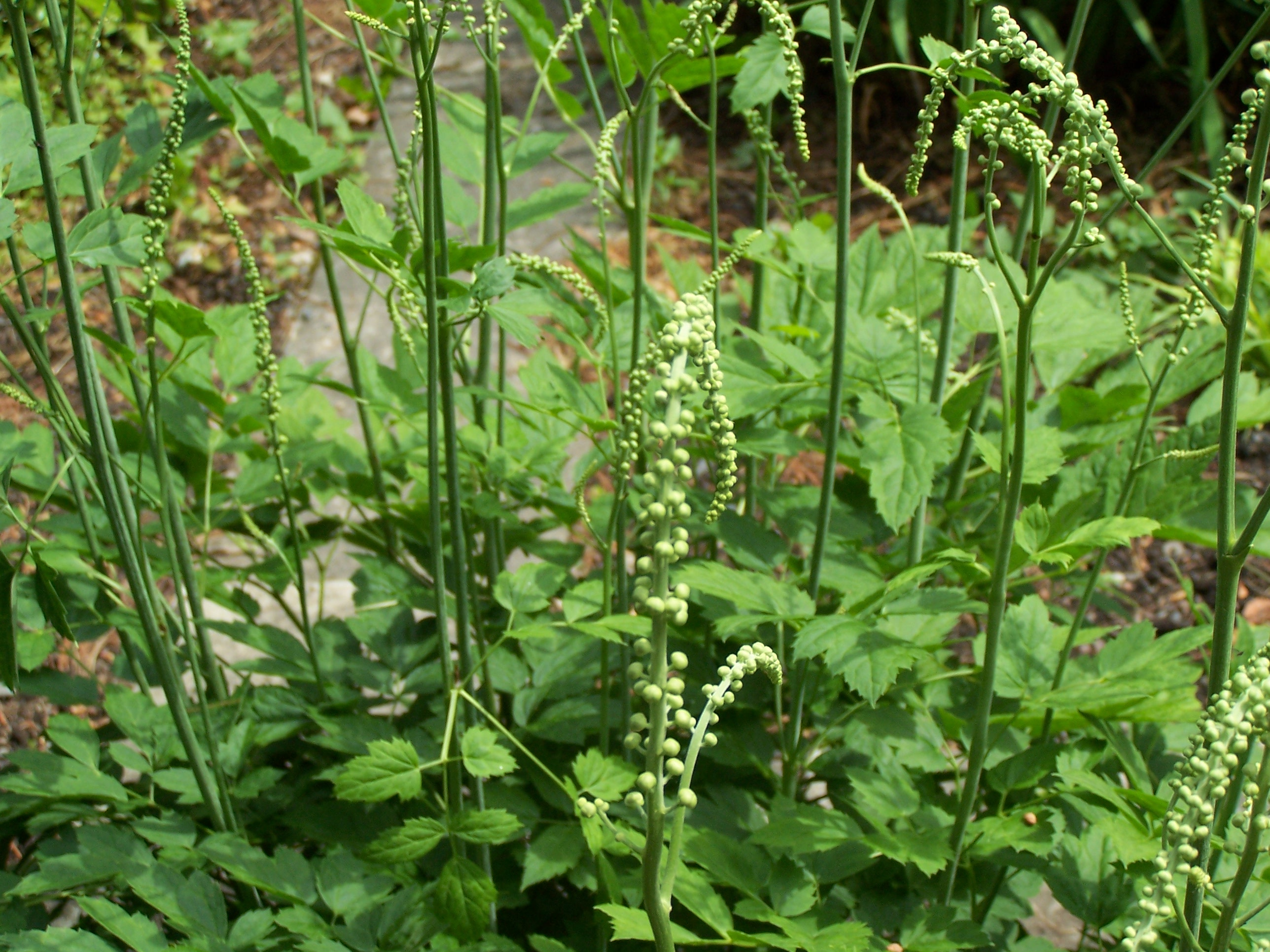 Cimicifuga racemosa 17 juin 2006 Vieux jardin botanique de Göttingen